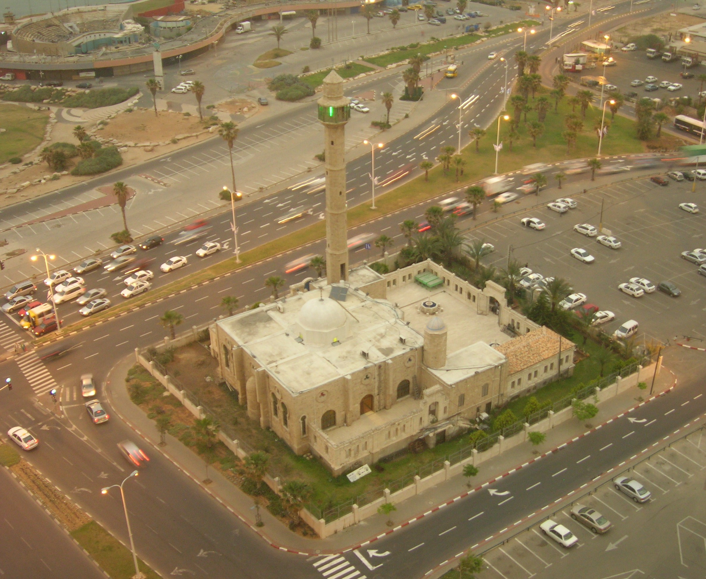 i042107 040 Tel Aviv